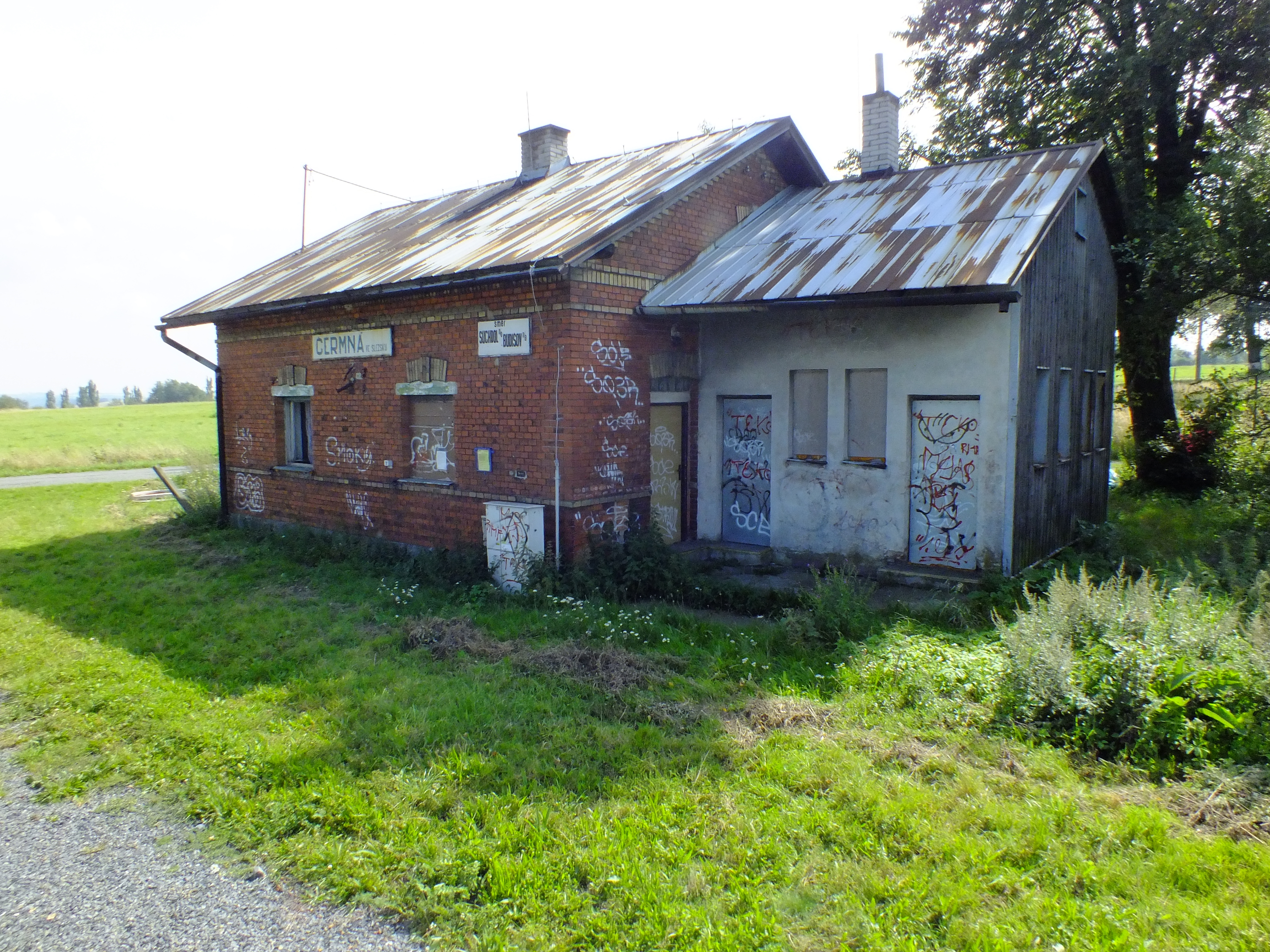 Čermná ve Slezsku, staniční budova.